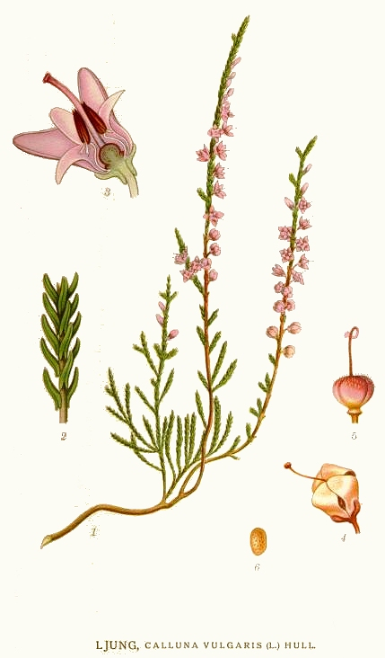 Original Description Ljung, Calluna vulgaris (L.) Hull.